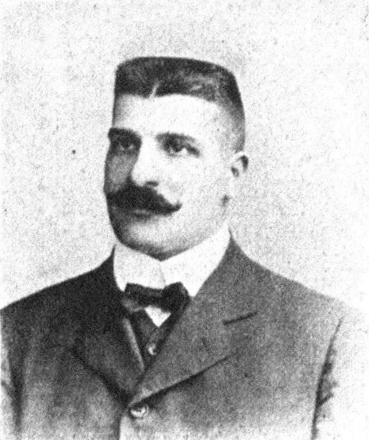 Österreichischer Politiker, Reichsratswahl 1907, Name siehe Dateiname